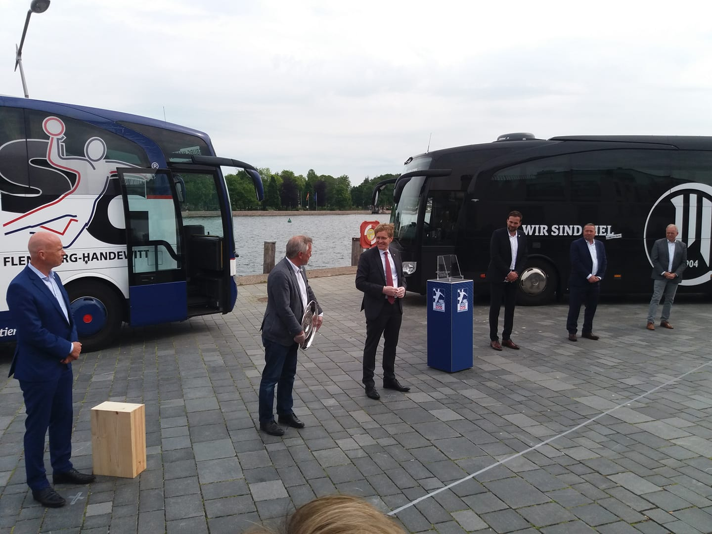 Meisterschalenübergabe im Hafen von mit Ministerpräsident Daniel Günther Eckernförde 2020. Von links: Chef des Beirats FL-Handewitt Boy Meesenburg, Manager FL-Handewitt Dierk Schmäschke, Schleswig-Holsteins Ministerpräsident Daniel Günther, THW Kiel-Geschäftsführer Viktor Szilágyi, THW Kiel-Aufsichtsratsvorsitzender Marc Weinstock sowie Jörg Sibbel, Bürgermeister von Eckernförde.